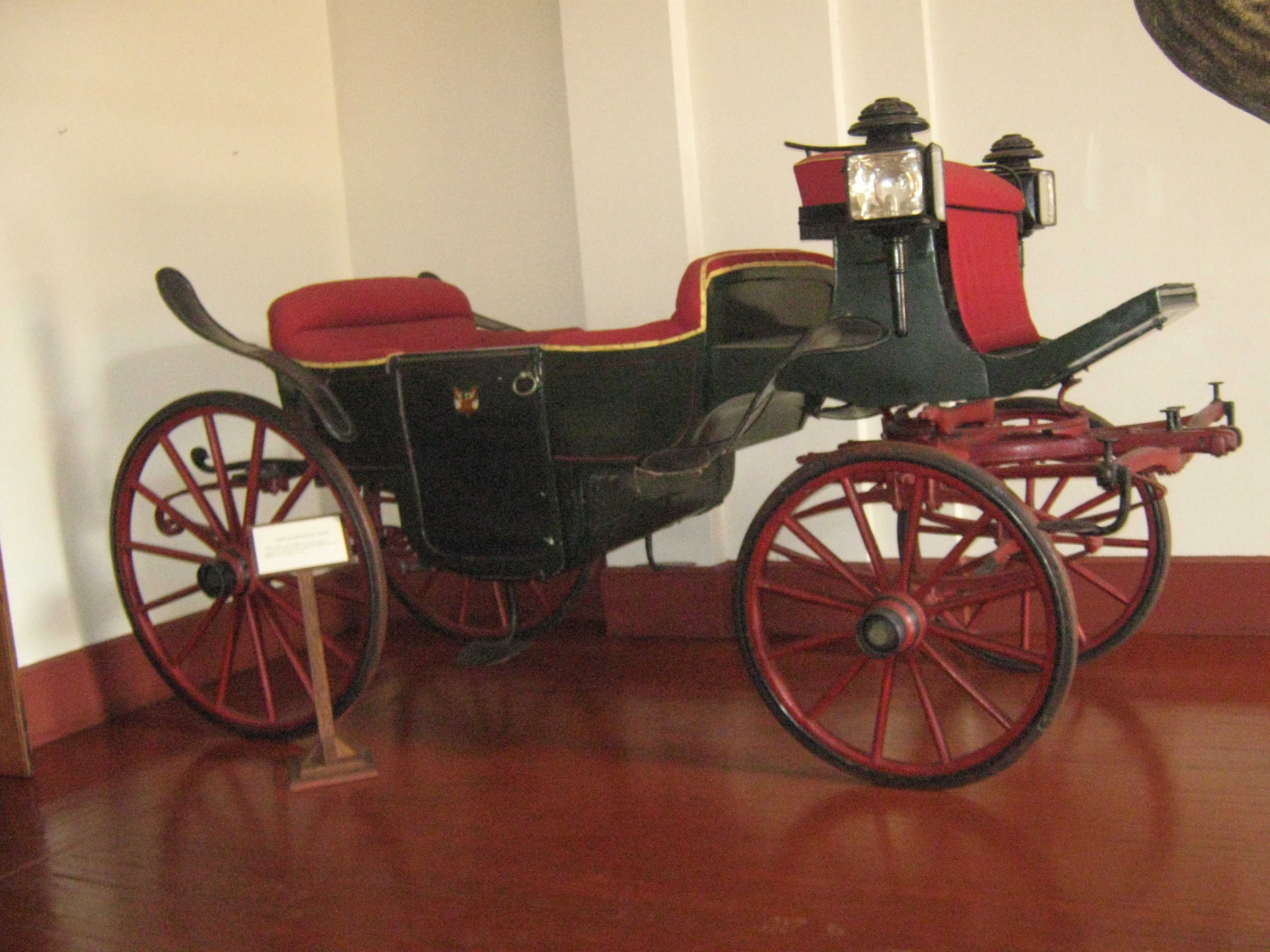 Carruaje presidencial del perú , desde el inicio del siglo XX